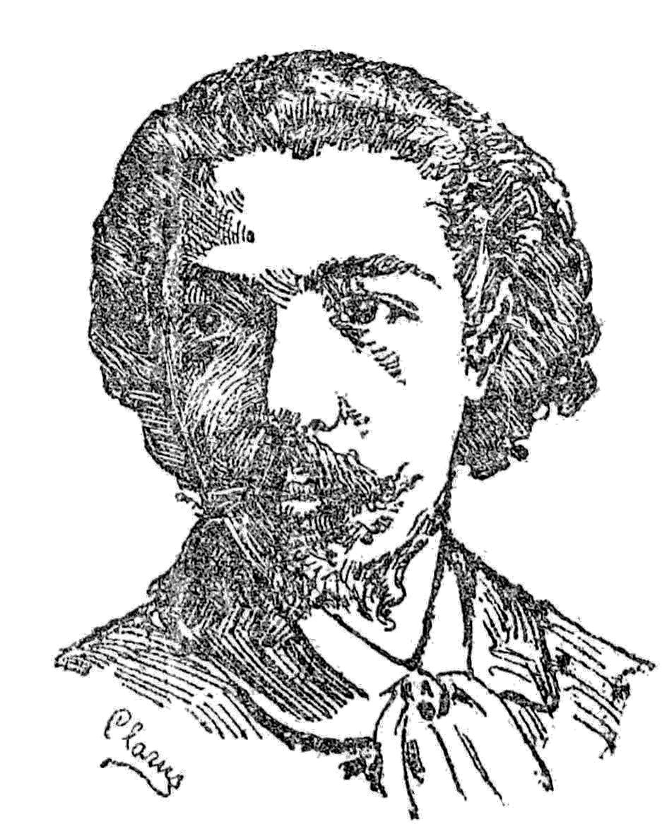 "Deville (Gabriel), publiciste".